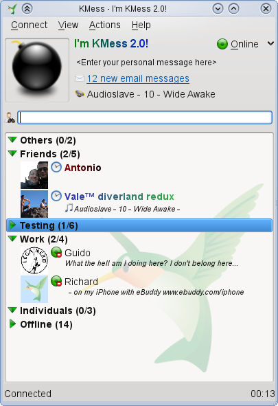 KMess